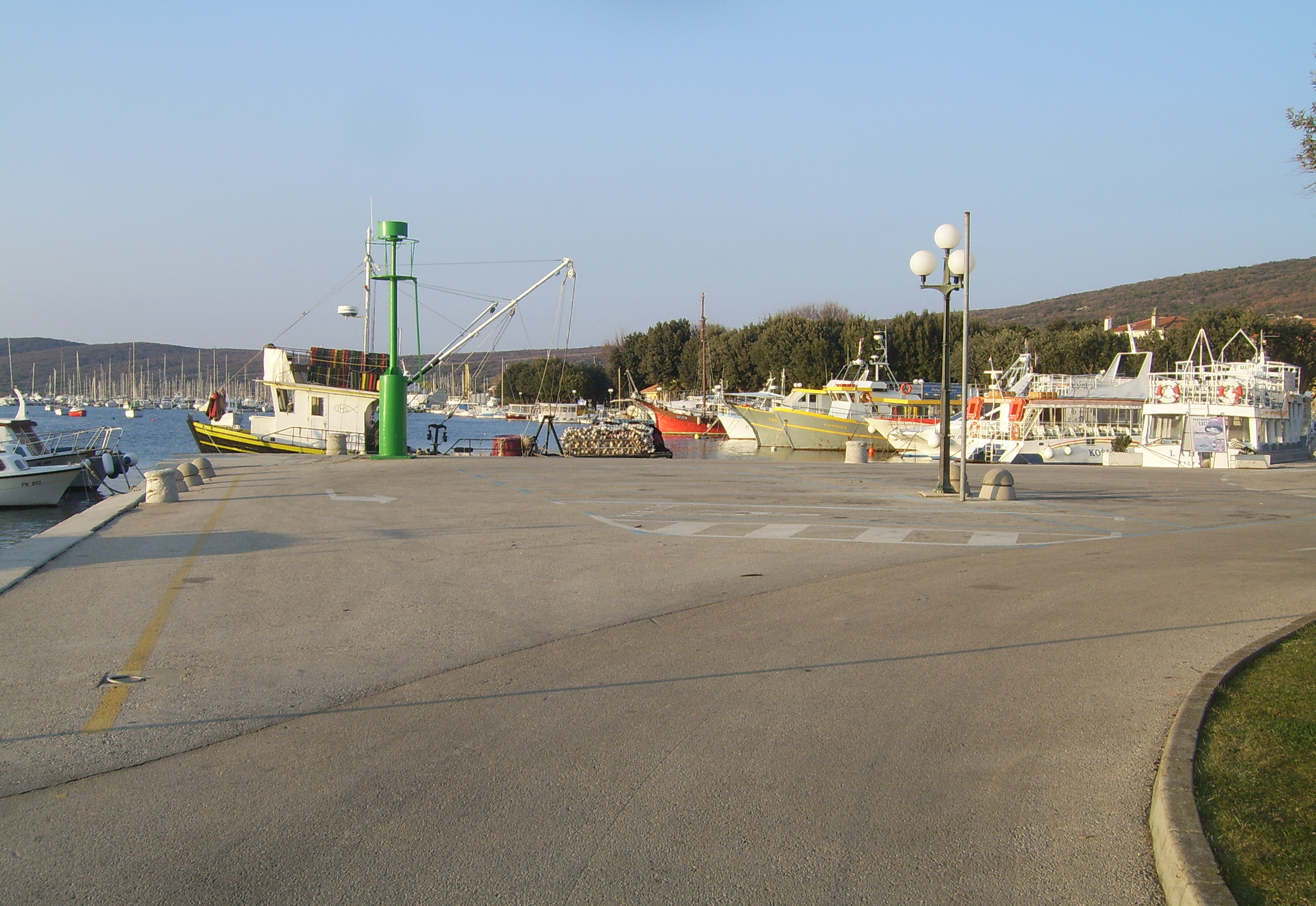 Operativna obala u Puntu, lokalno čakavski "Punćale"